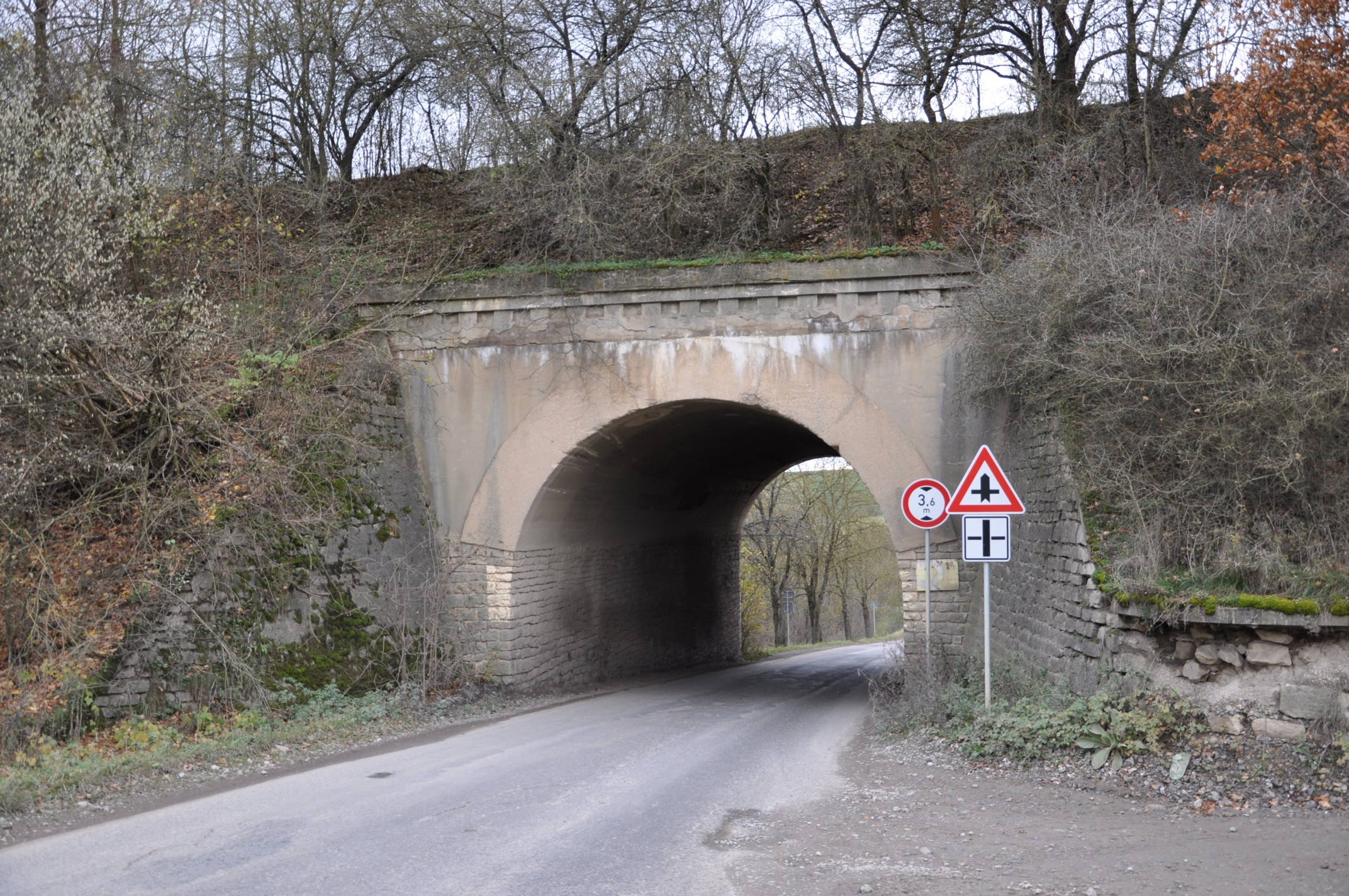 Eisenbahnbrücke der ehemaligen Kladno-Nučicer Bahn bei Mořina